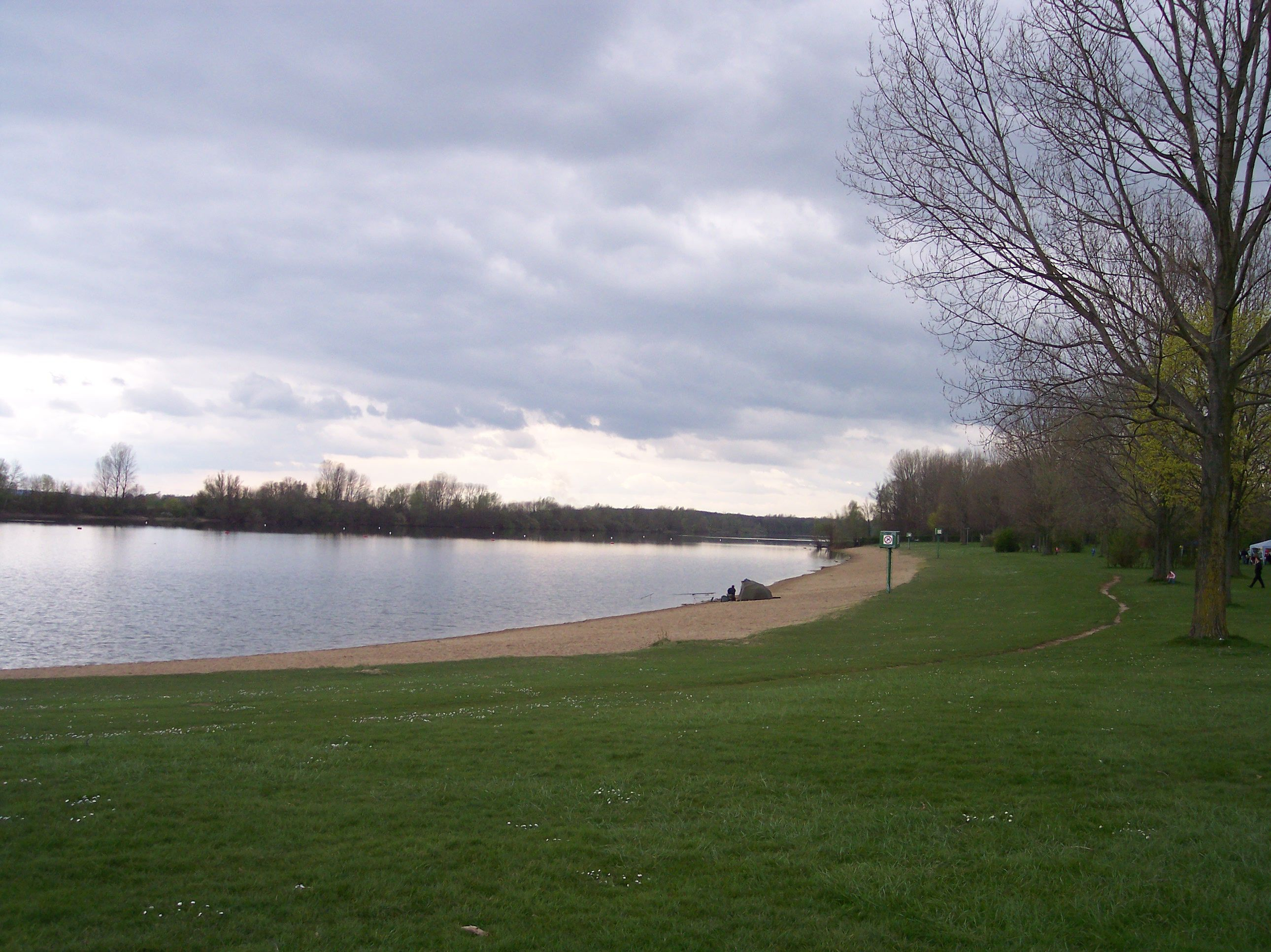 Wesel Auesee